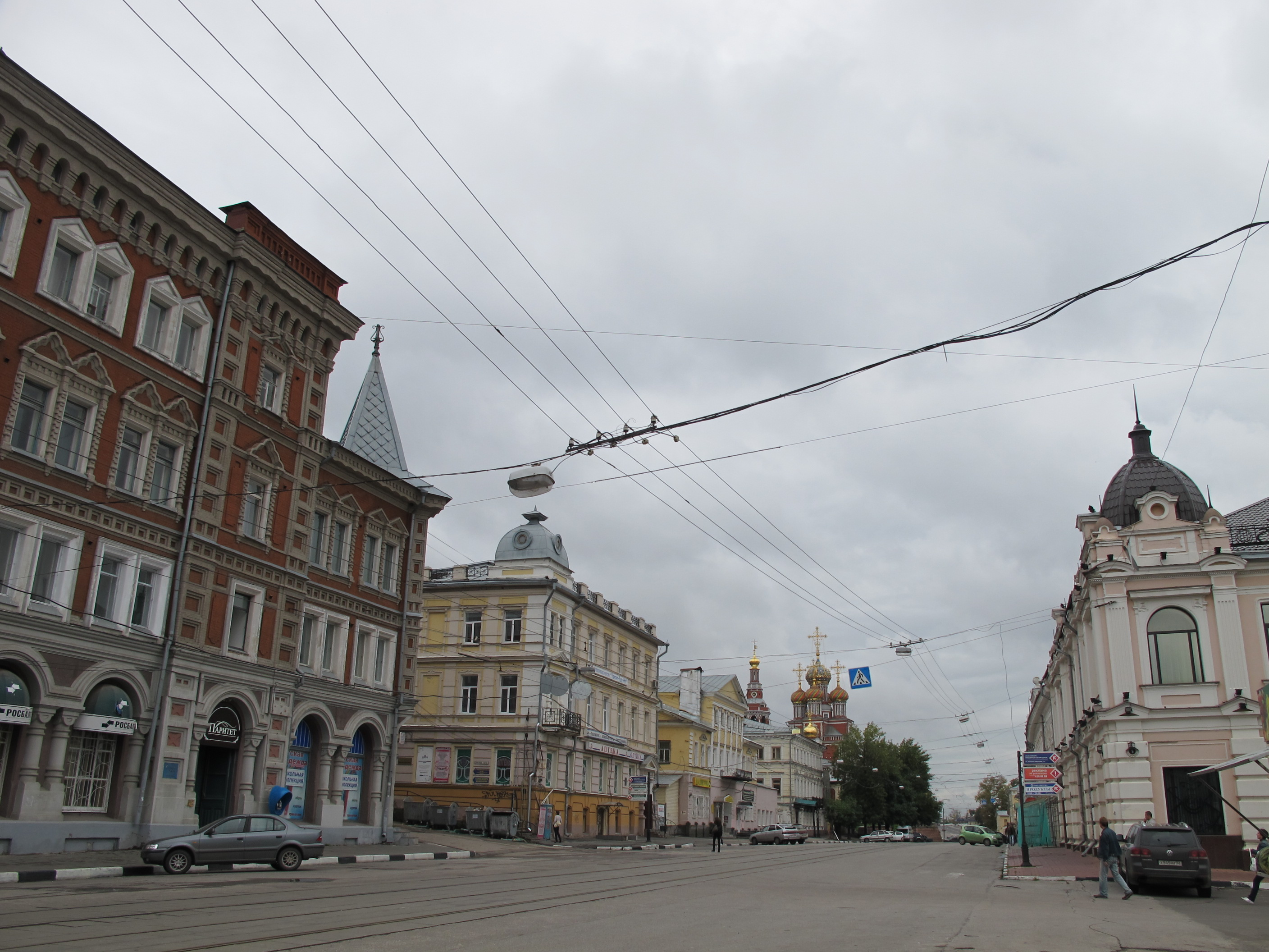 Рождественская улица, Нижний Новгород